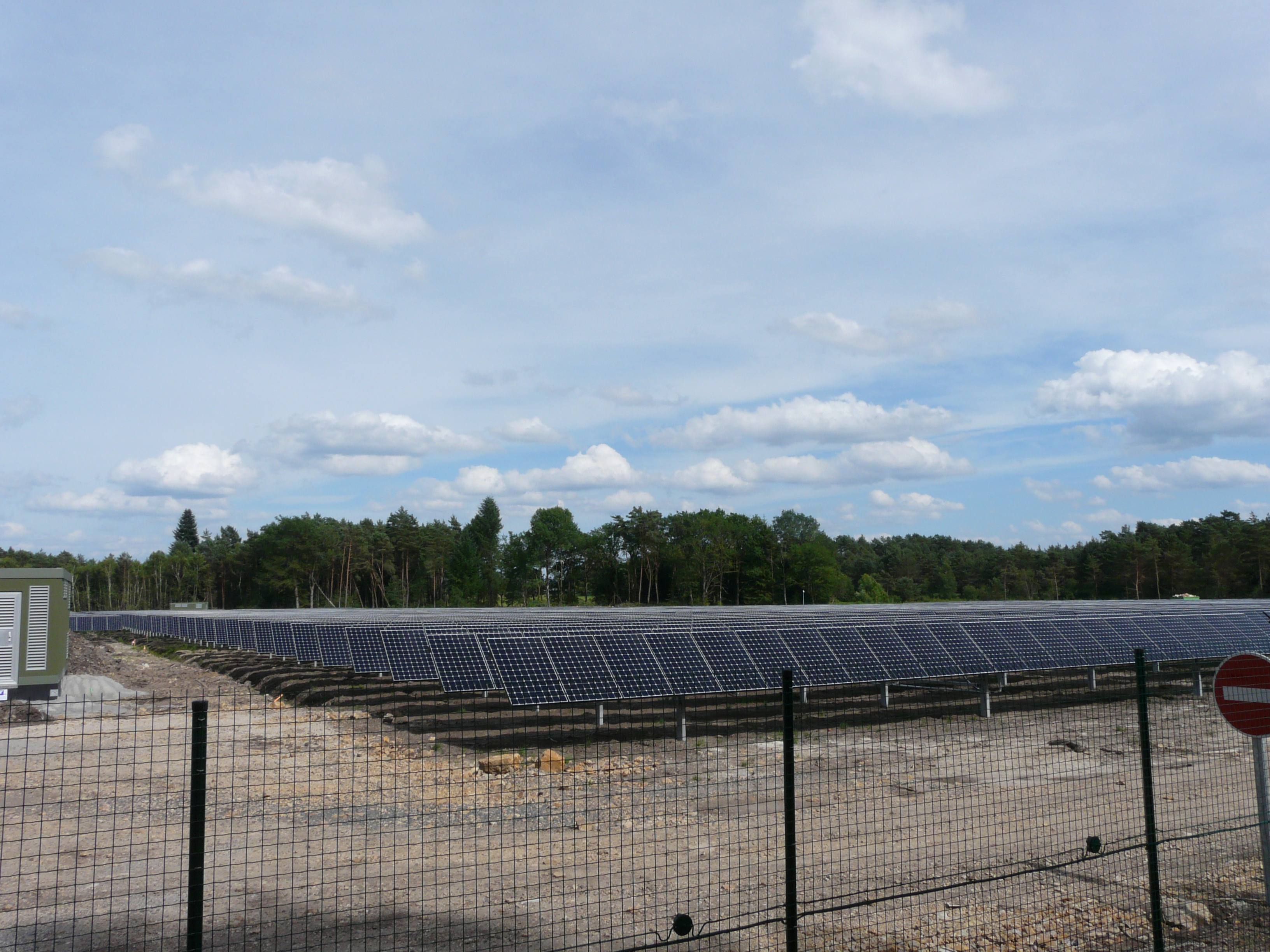 Centrale photovoltaïque le long de la route départementale 18, Gros-Chastang, Corrèze, France.